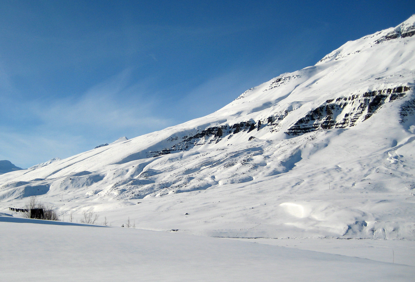 Urðabjörg rock slide, Svarfaðardalur, N-Iceland